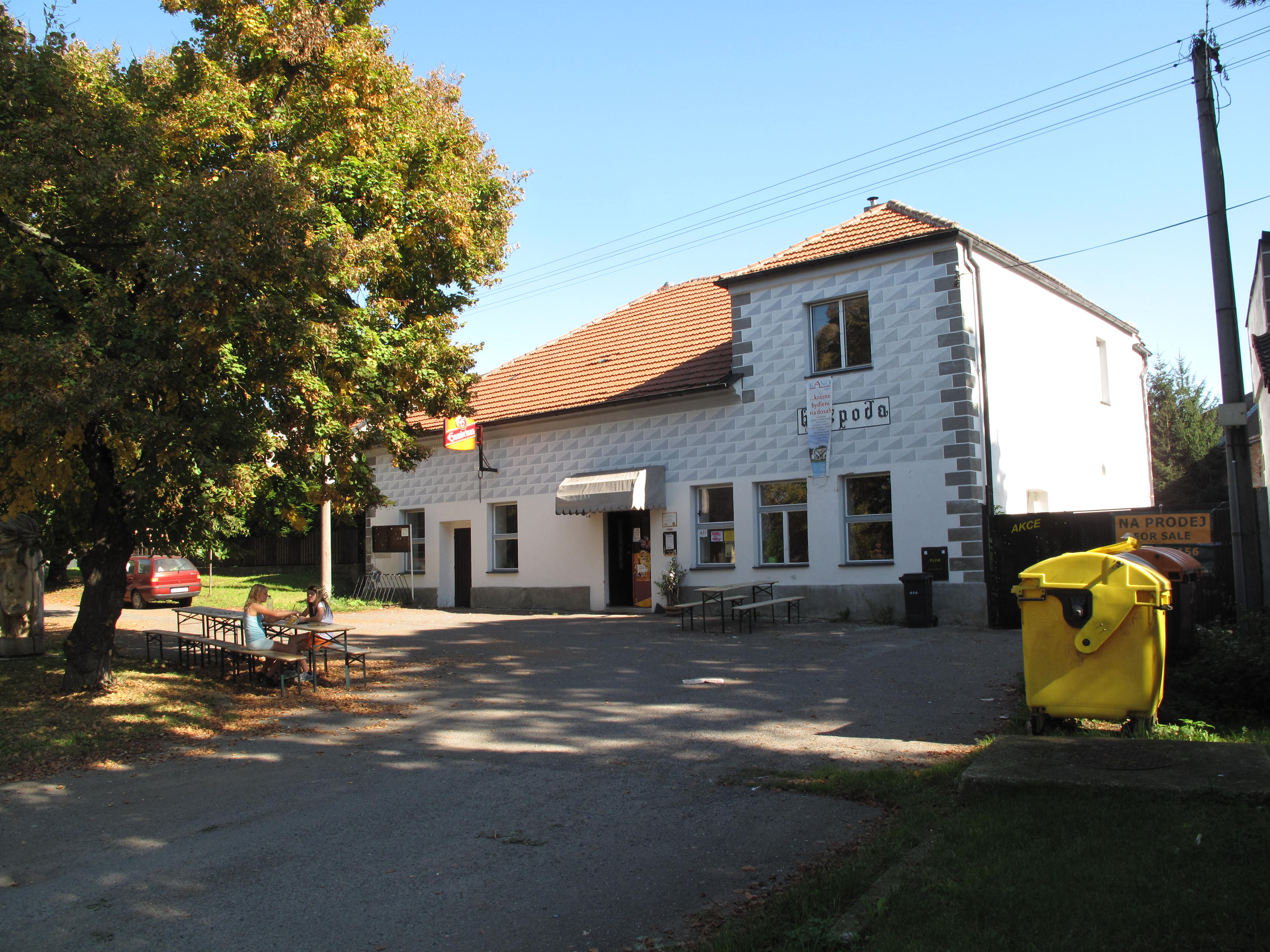 Větrušice